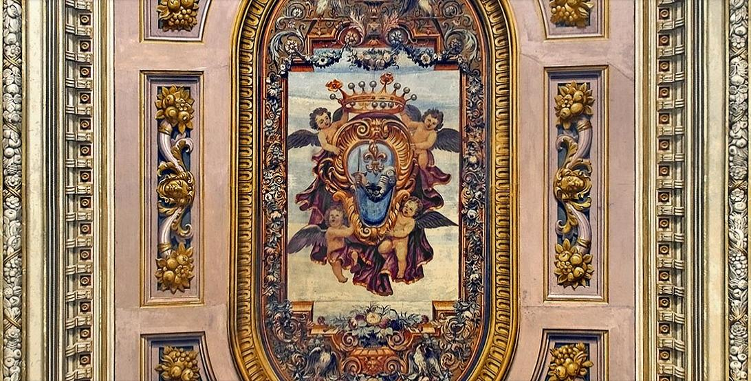 Soffitto affrescato di una sala di palazzo Magnani - Feroni